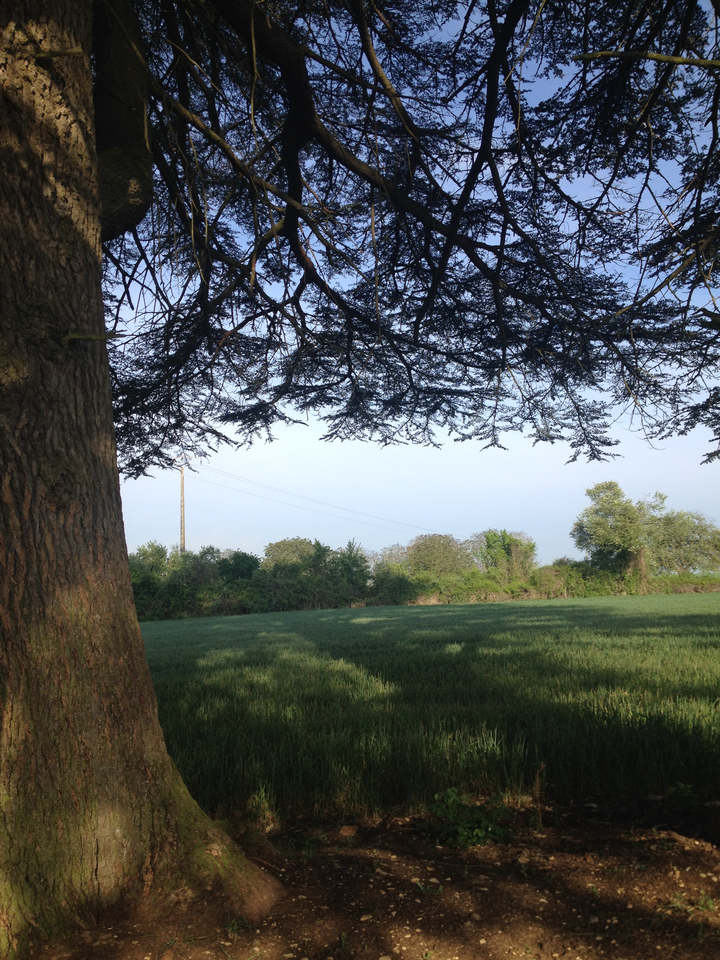 Les cèdres de la Lavière.